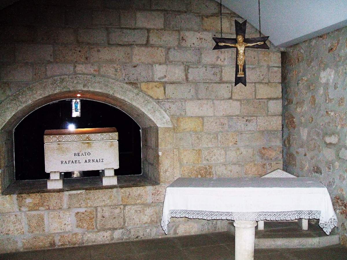 Capilla del Beato Rafael Arnaiz, en el Monasterio de San Isidro de Dueñas (La Trapa), en Venta de Baños